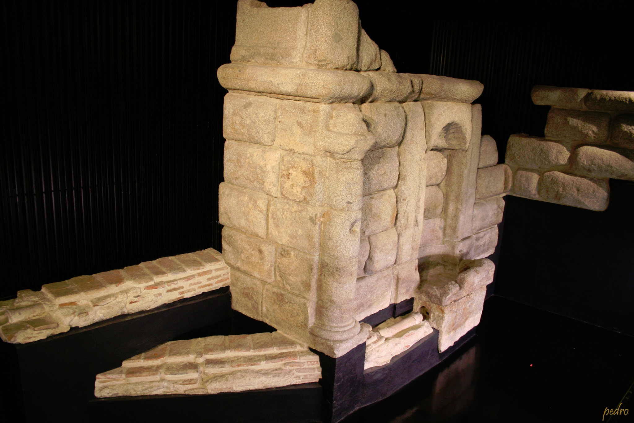 Restos Arqueologicos Caños del Peral (3)